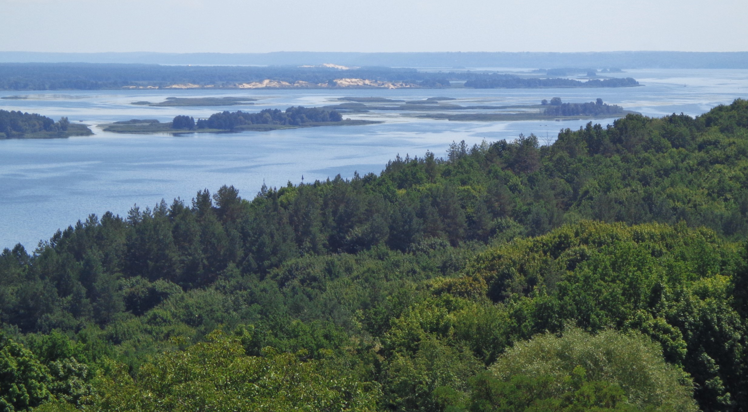 «Стайківські обрії», Кагарлицький район, Стайківська сільська рада